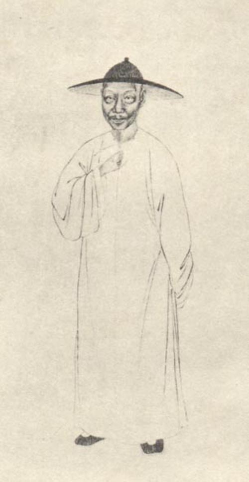 清代学者。Wang Xian